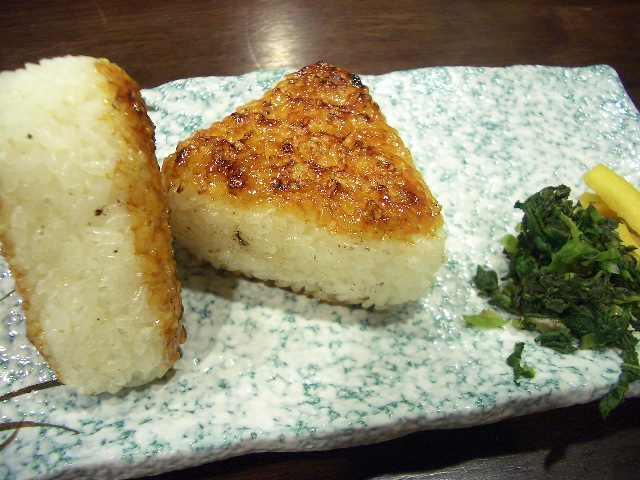 Yaki-onigiri (Gegrillt Onigiri).